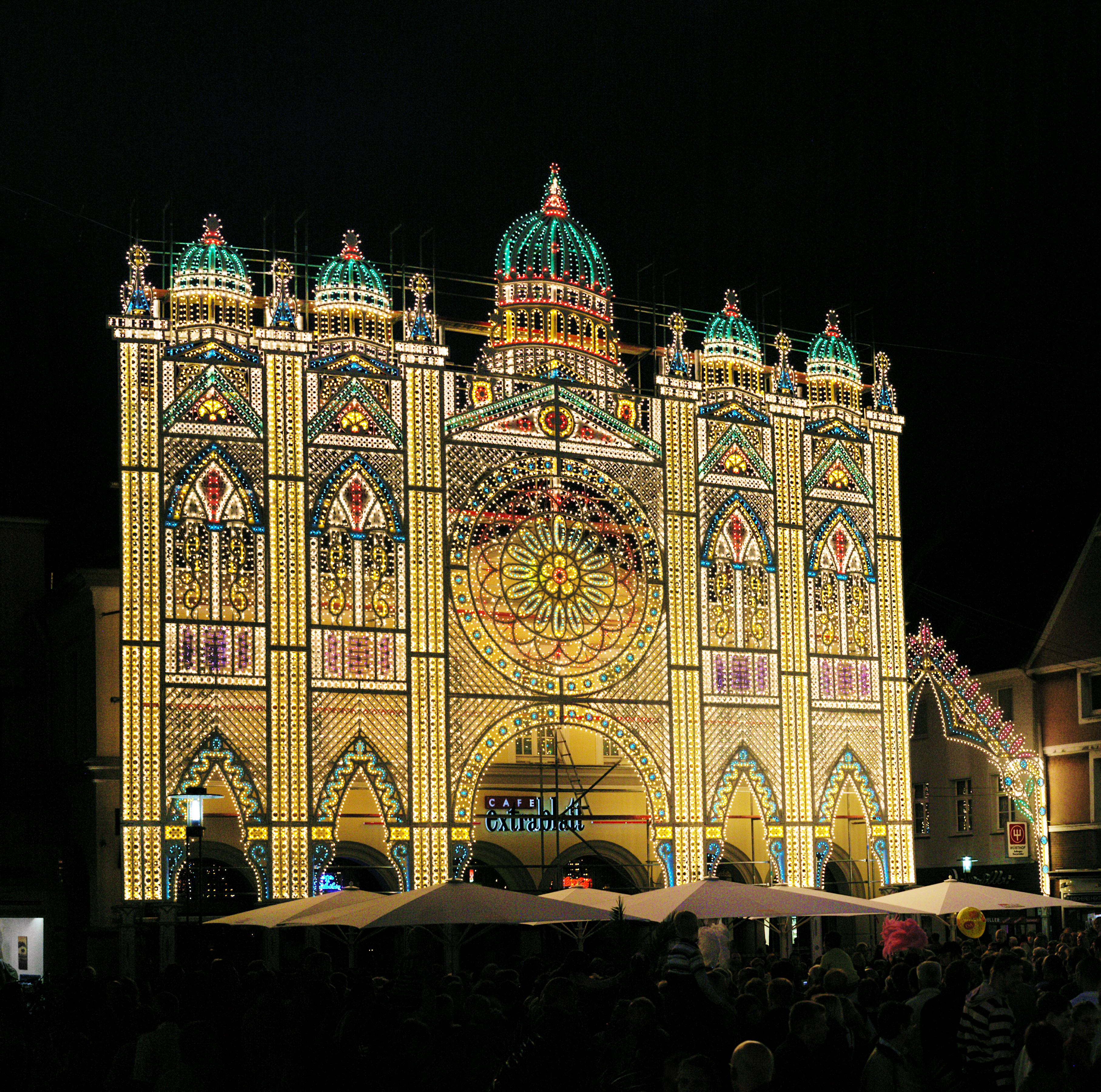 Illumination auf dem alten Markt in Unna für das italienische Fest "Un(n)a festa italiana". Aufnahme einige Tage vor der offiziellen Eröffnung während der "Extraschicht"